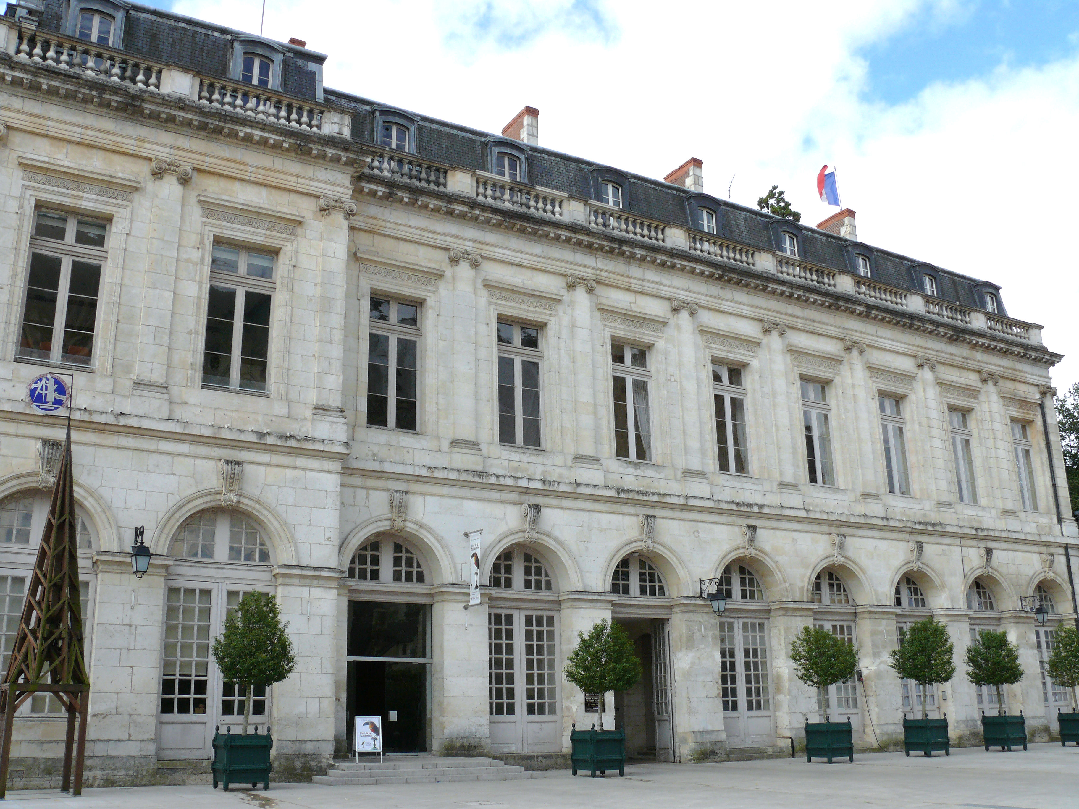 Bourges - Palais archiépiscopal - Façade vers la cathédrale